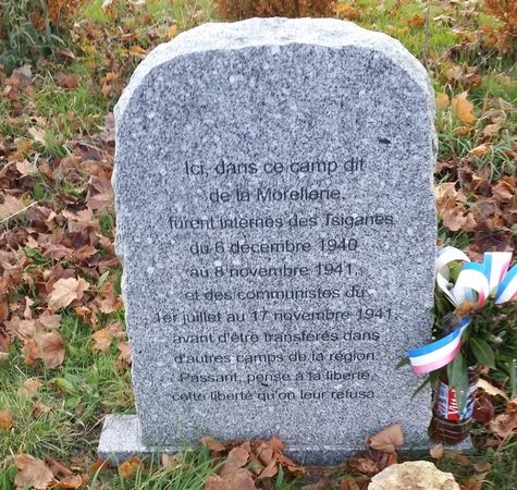 Avrillé-les-Ponceaux - Stèle du camp de transit "La Morellerie"